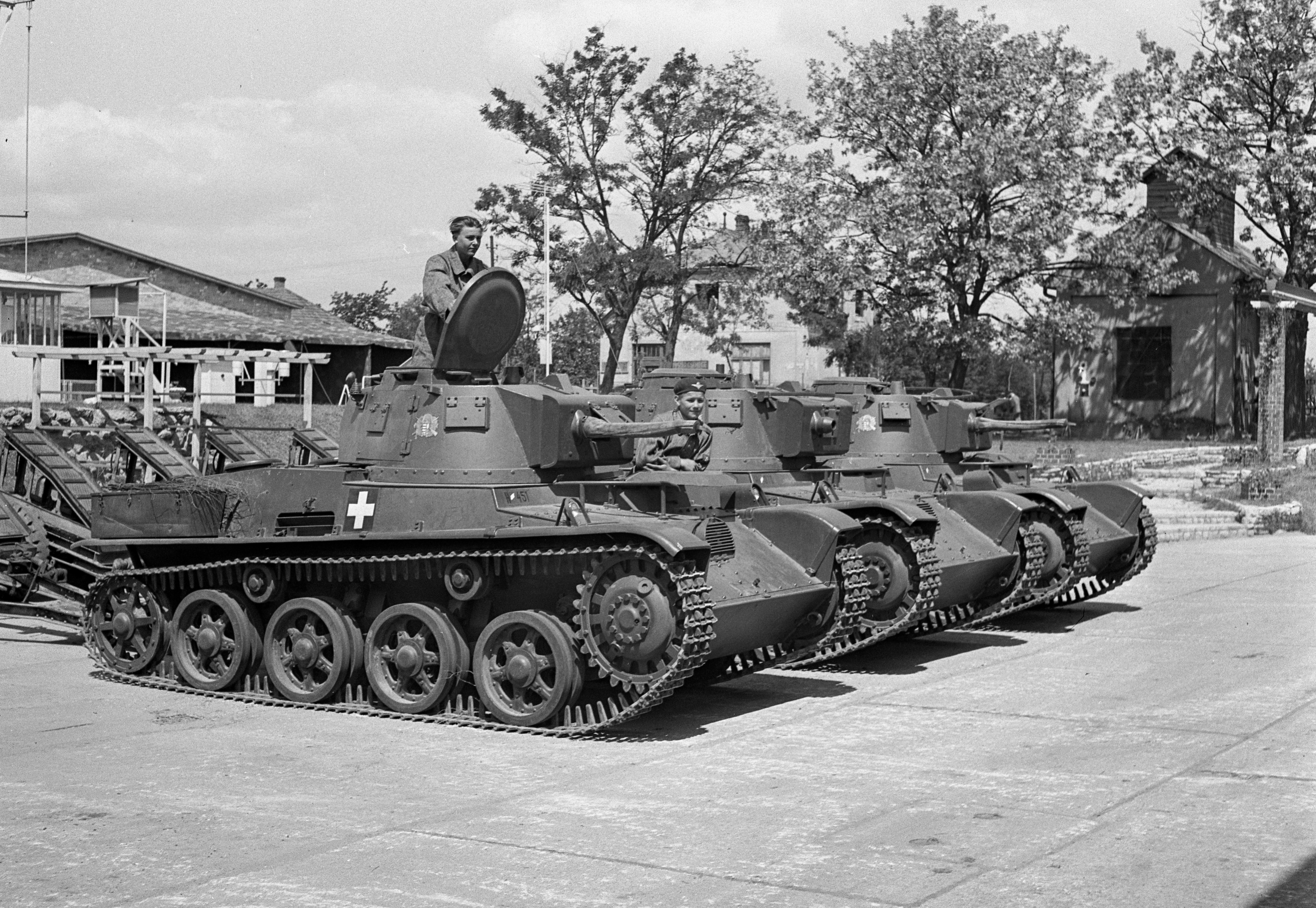 Mátyásföld, Újszász utca 41-43. Magyar Királyi Honvéd gépkocsiszertár udvara, MÁVAG gyártmányú 38M Toldi könnyű harckocsik. Location: Hungary, Budapest XVI. Tags: tank, Hungarian brand, MÁVAG-brand, Budapest Title: Mátyásföld, Újszász utca 41-43. Magyar Királyi Honvéd gépkocsiszertár udvara, MÁVAG gyártmányú 38M Toldi könnyű harckocsik.